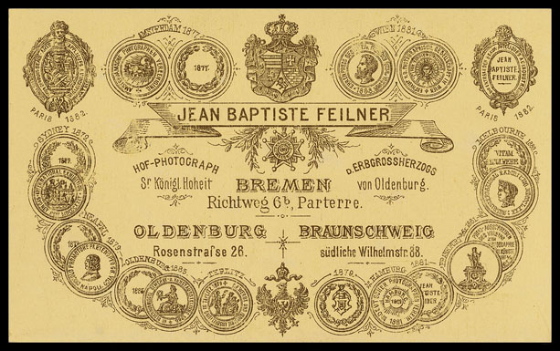 Leider ein etwas zu gering aufgelöstes Revers einer Carte de Visite von Jean Baptiste Feilner mit Adressen der Ateliers und Abbildungen verschiedener Auszeichnungen